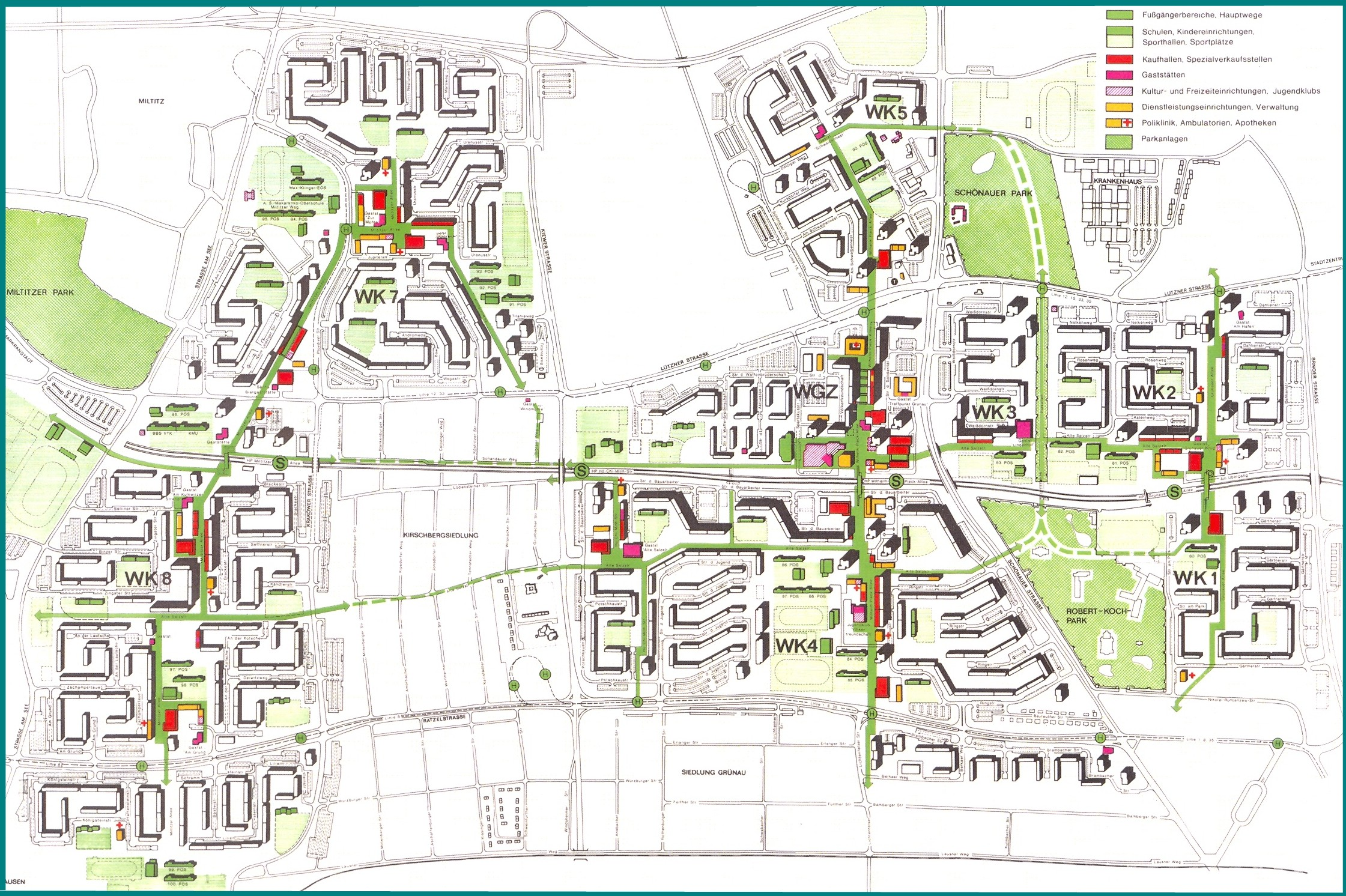 Leipzig-Grünau; neuer Stadtteil für etwa 100.000 Einwohner, Planungsstand ~ 1985 Städtebauliche Gesamtplanung - funktionelle sowie städtebau-räumliche Gestaltungsidee: Team Leipziger Architekten und Ingeneure unter Leitung von Prof. Dr.-Ing. Horst Siegel, Chefarchitekt der Stadt Leipzig. Siehe auch "Autorenverzeichnis des Wohngebietes Leipzig-Grünau ..." vom 1.12.1982 (BBA/BKL/BCA/BfaK)